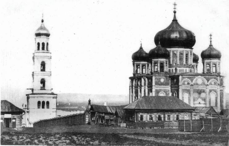 Самара. Улица Александровская (ныне Вилоновская). Иверский монастырь